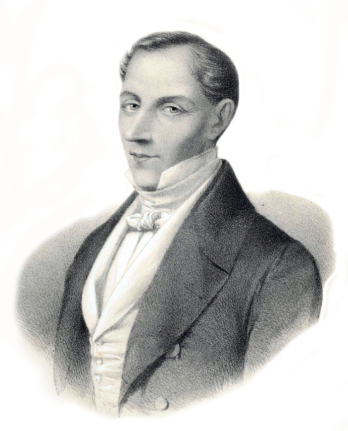 El ministro chileno Don Diego Portales